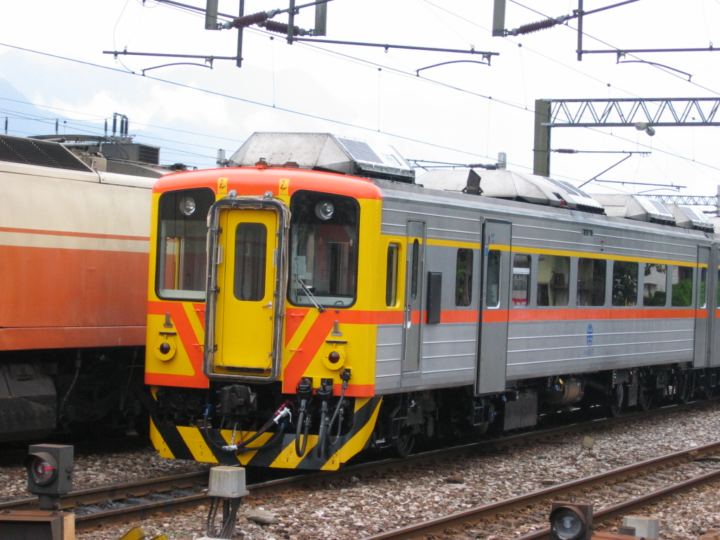 中文（台灣）: 臺灣鐵路管理局DR3100型自強號在花蓮